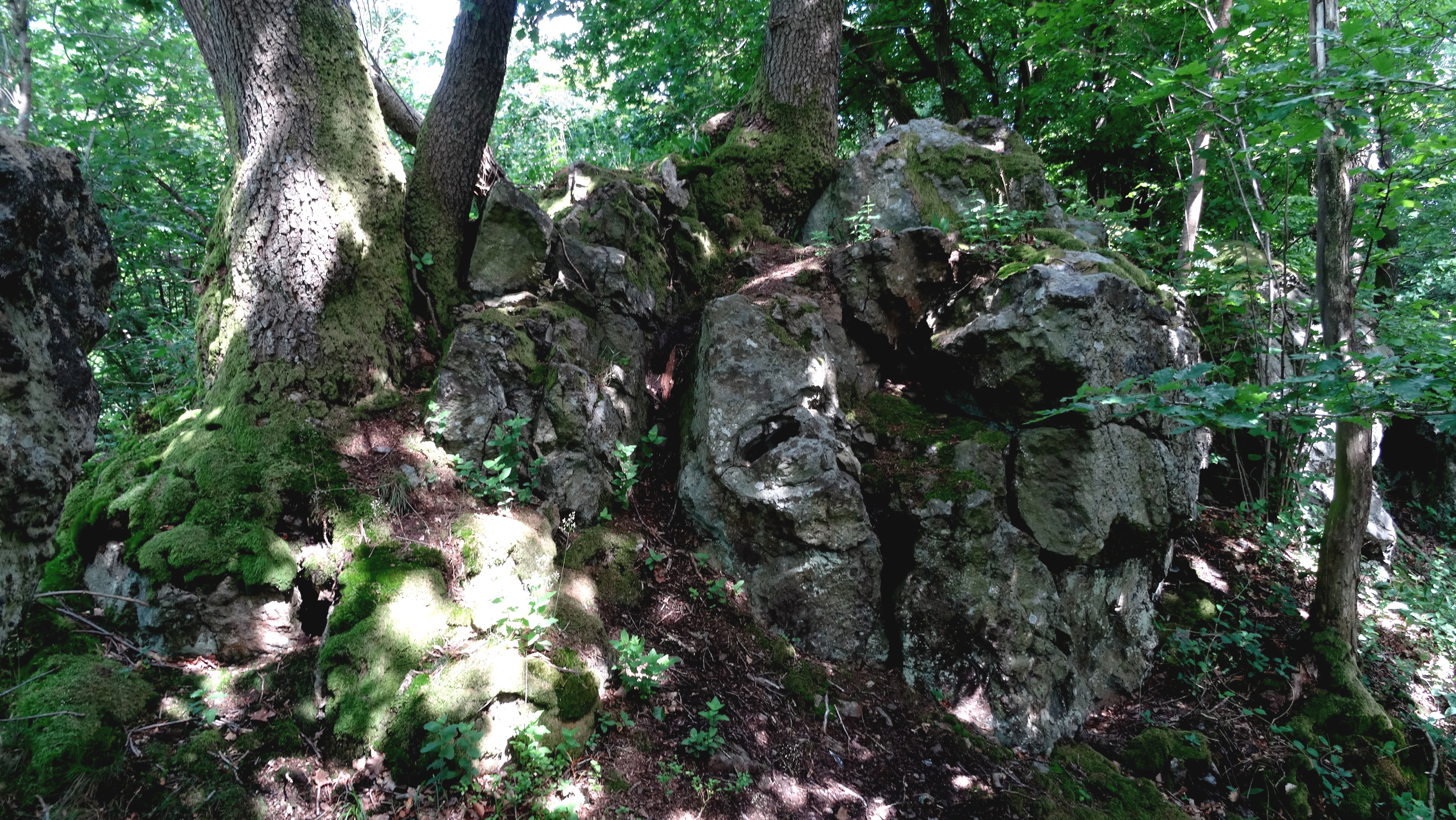 NSG Hunstein Felsen und Baum